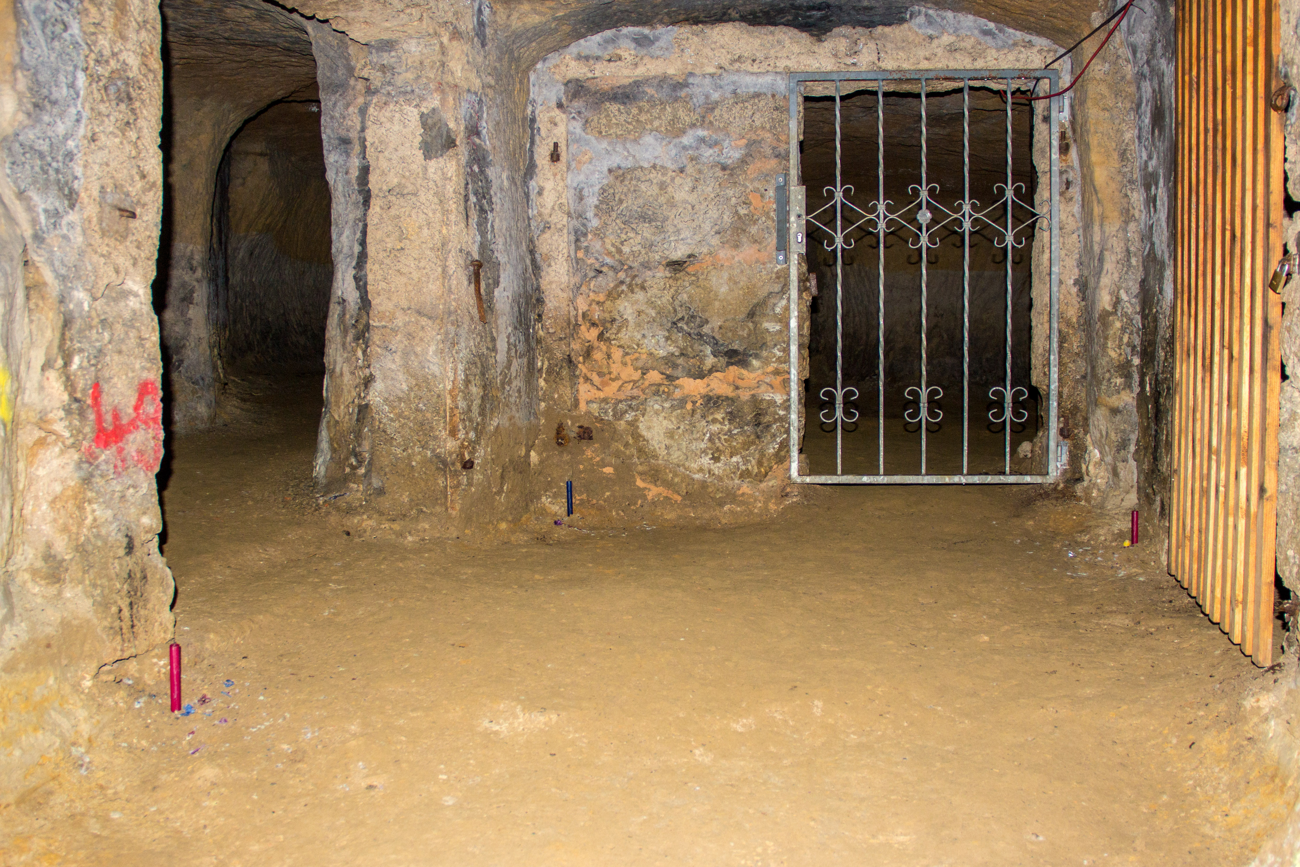 Felsenkeller unter dem Burgberg, EgloffsteinThis is a photograph of an architectural monument.